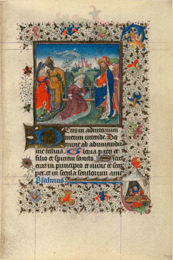 Getijdenboek van Katharina van Kleef, Morgan Library, M.917 p.109, De koningin van Sheba waadt door een beek omdat ze niet over de brug wil lopen die gemaakt is van het hout waaraan de messias zal gekruisigd worden.